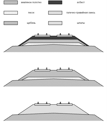 Поперечные разрезы балластных призм: трёхслойная, двухслойная, однослойная.